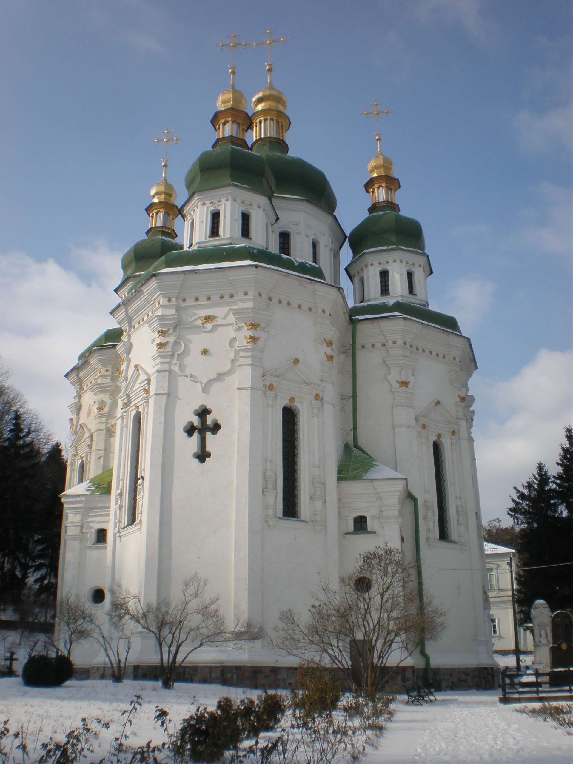 Видубицький монастир.